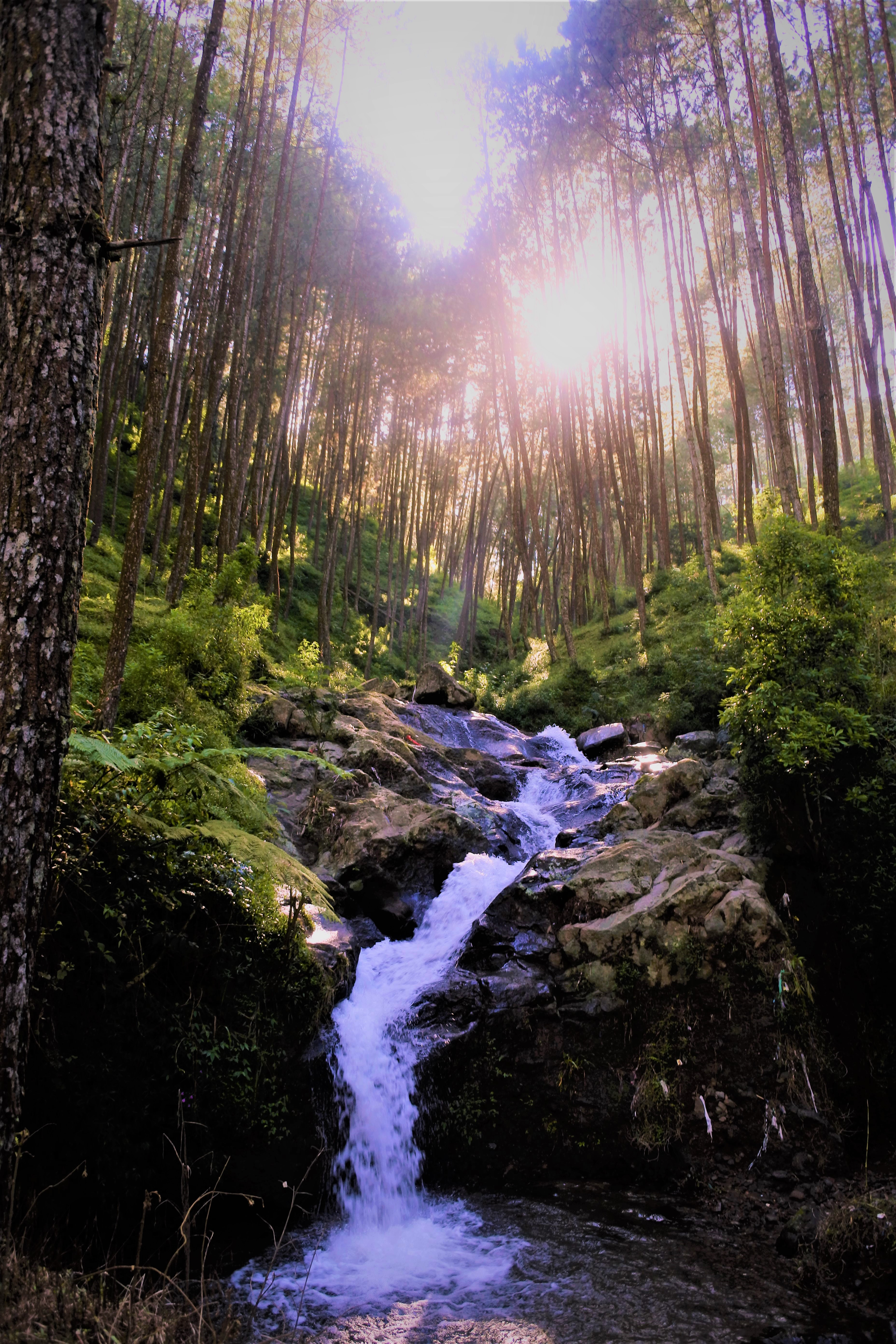 Curug yang berada di Hutan Pinus Mangli¸ Dusun/Desa Mangli, Kecamatan Ngablak, Kabupaten Magelang, berada di ketinggian 1200-an Meter di atas permukaan laut. Hutan Pinus Mangli berada di bawah administrasi pengelolaan hutan oleh RPH Pager Gunung, Sektor Kesatuan Pemangkuan Hutan Ambarawa, yang merupakan salah satu BKPH di wilayah KPH Kedu Utara.